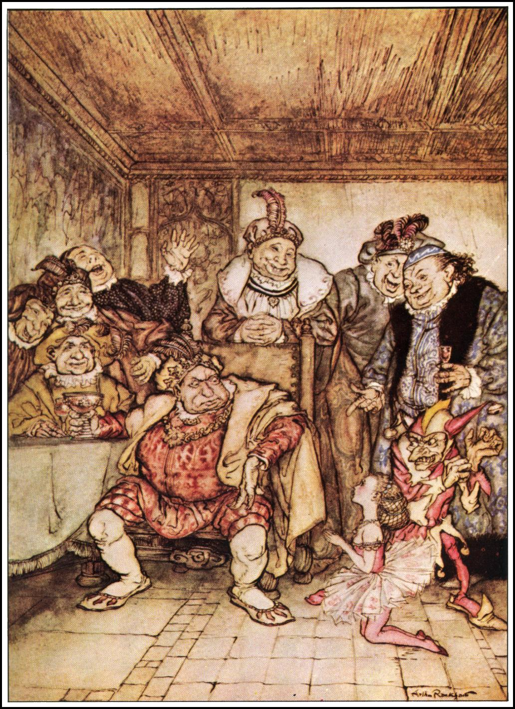 Иллюстрация Артура Рэкхема из книги "Poe's Tales of Mystery and Imagination" к рассказу Эдгара По "Прыг-Скок"